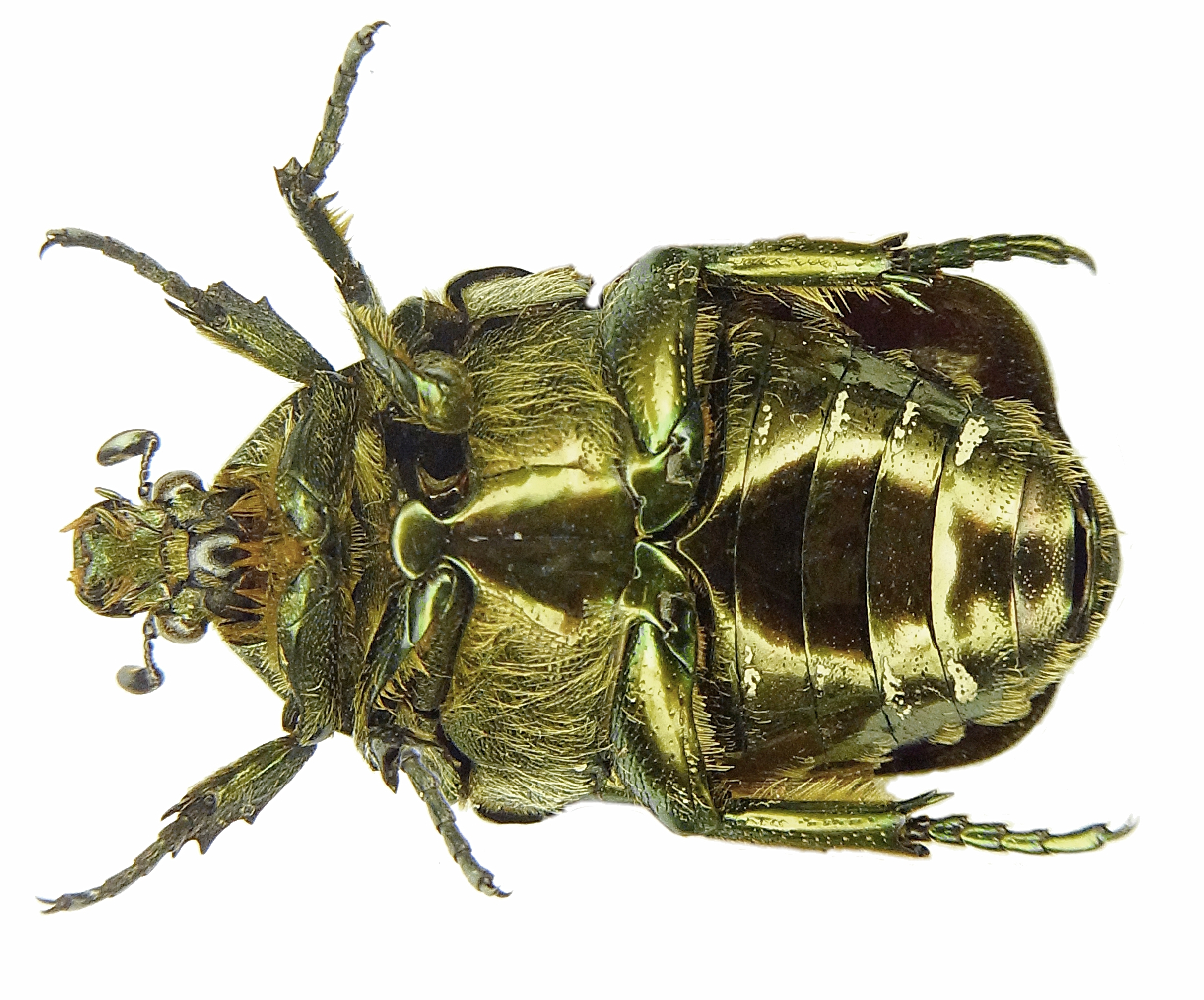 Protaetia lugubris, Unterseite